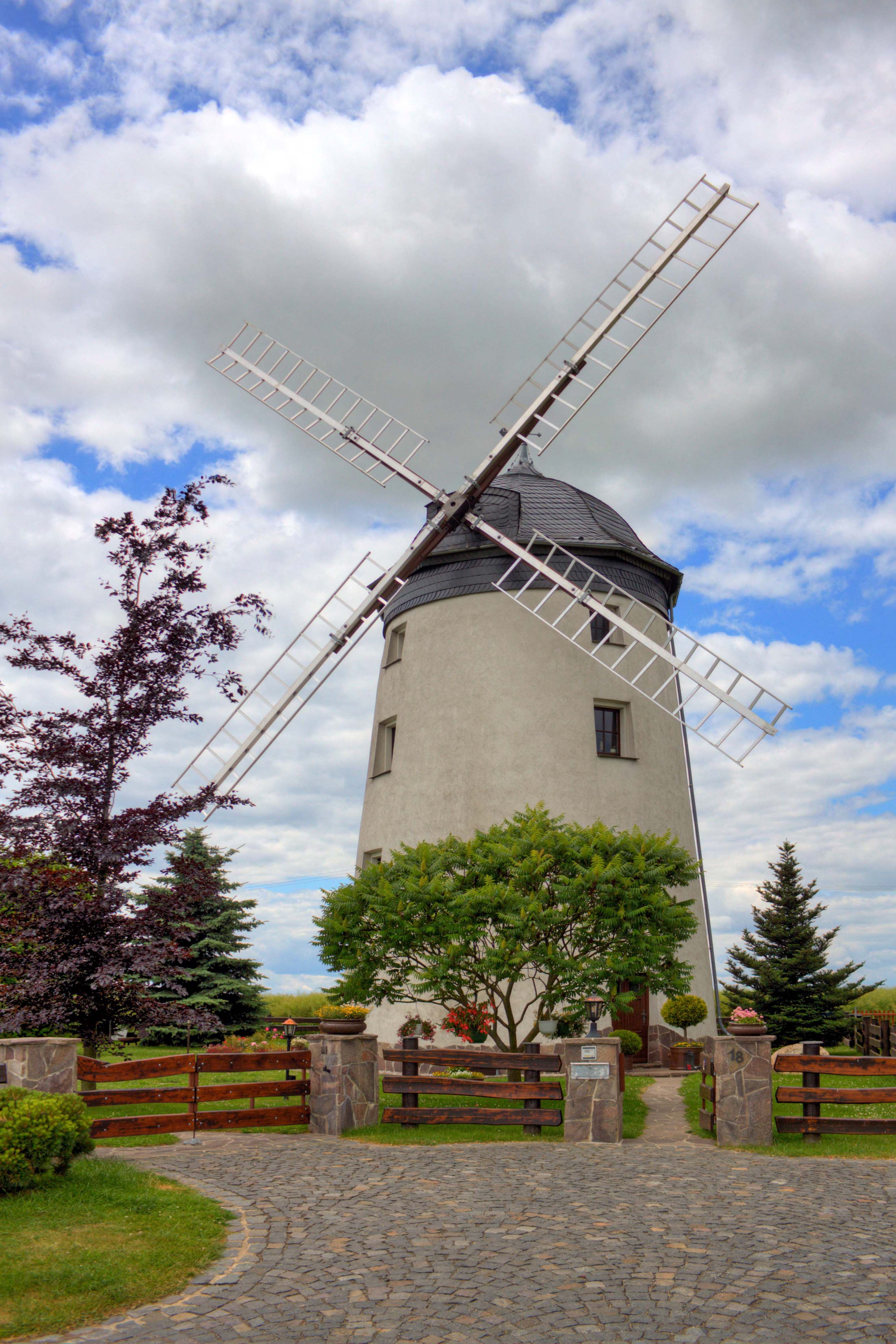 Turmholländermühle in Nauberg